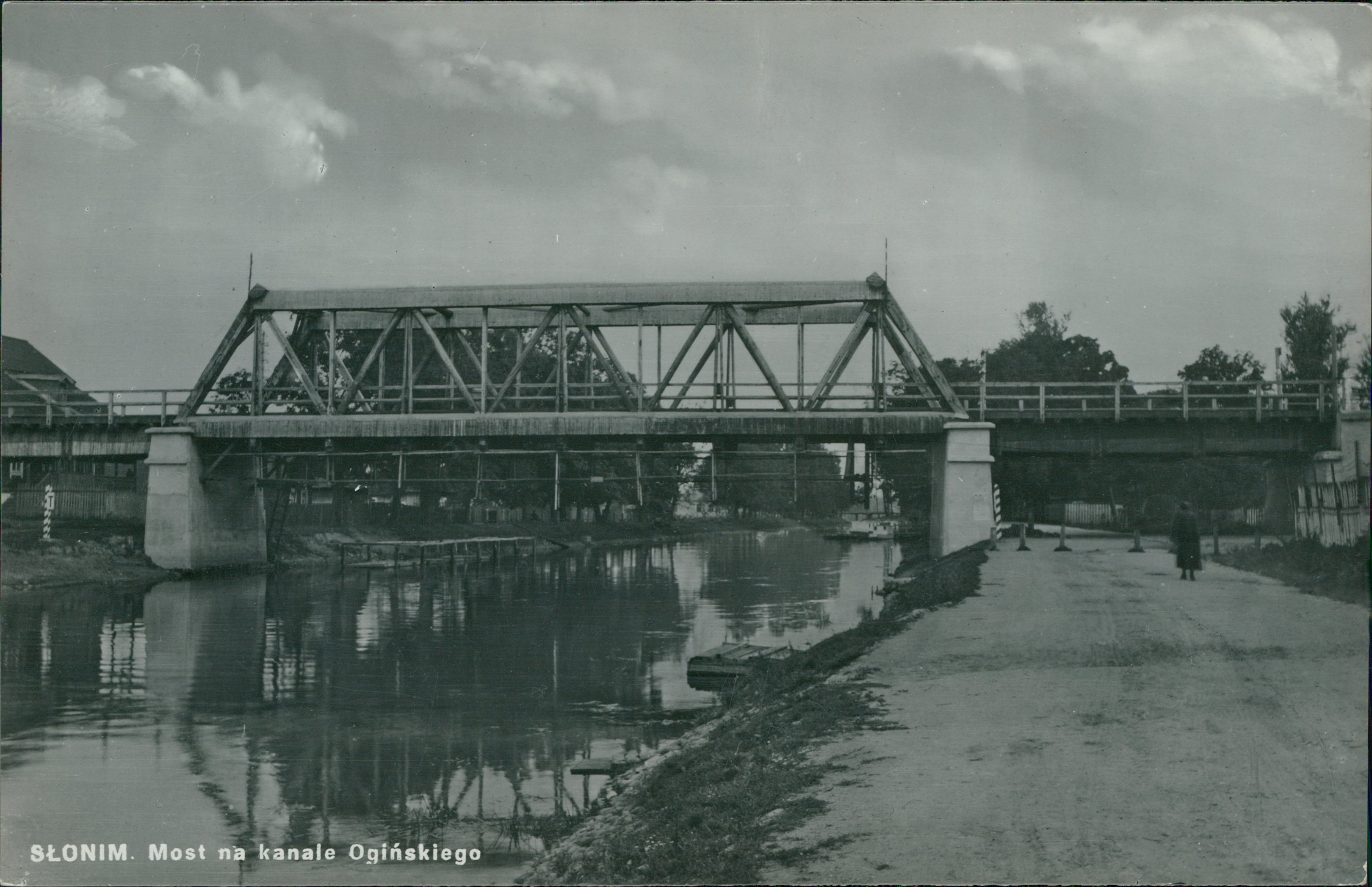 Беларуская (тарашкевіца): Слонім (Słonim), канал Агінскага (Aginski). Мост